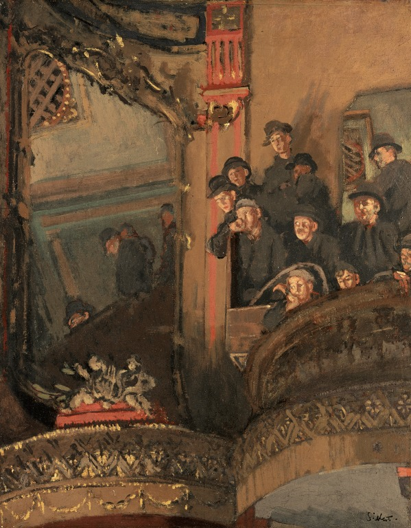 Walter Richard Sickert; 31 мая 1860, Мюнхен — 22 января 1942, Бат. The Old Bedford